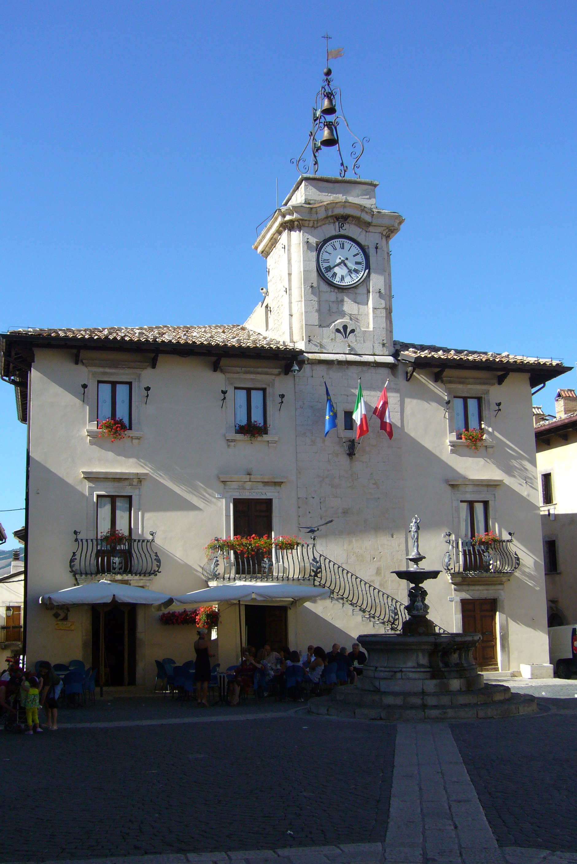 Pescocostanzo